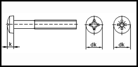 ISO 7045